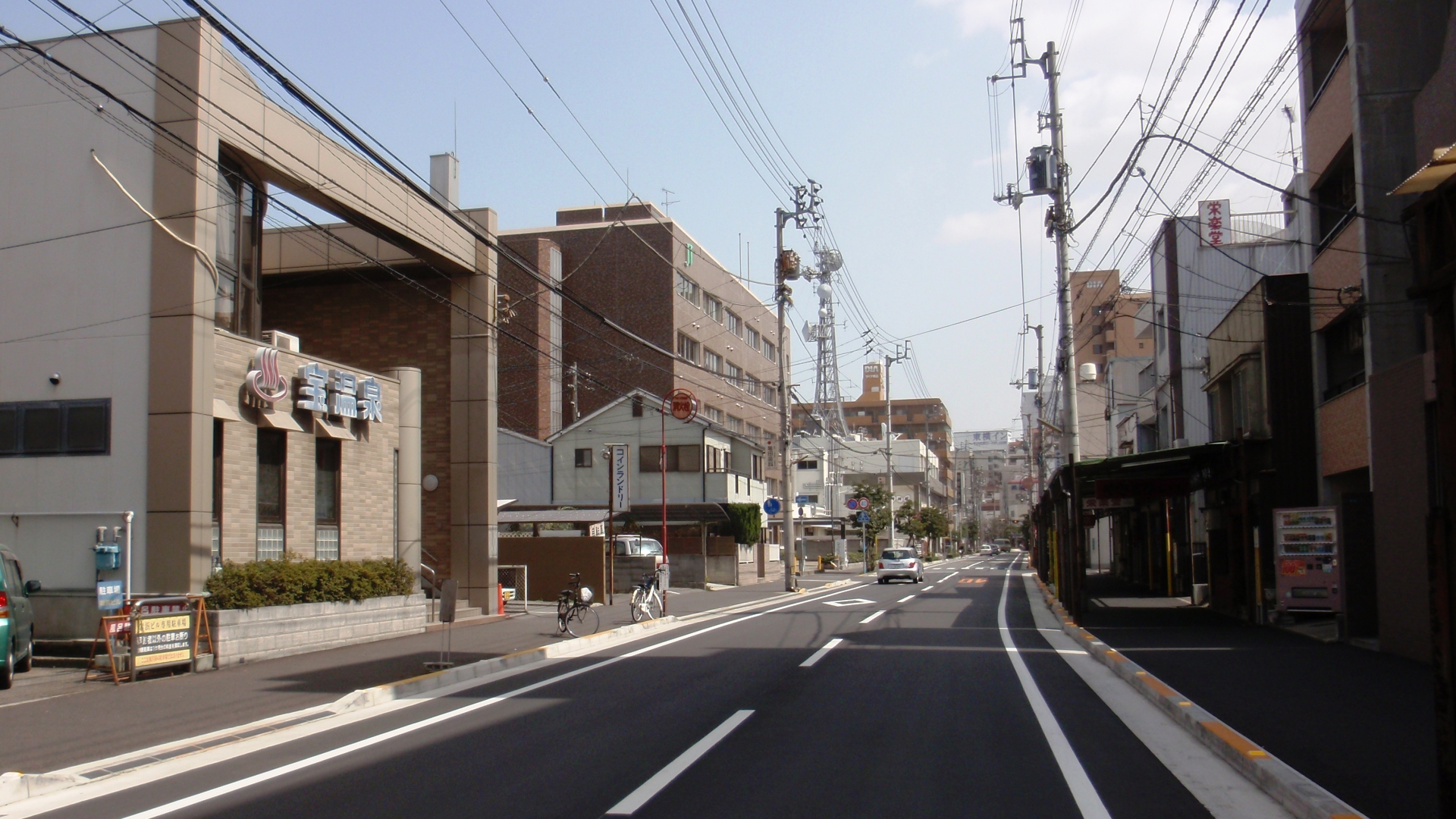 香川県高松市にある高松市道兵庫町西通町線の錦町部分。